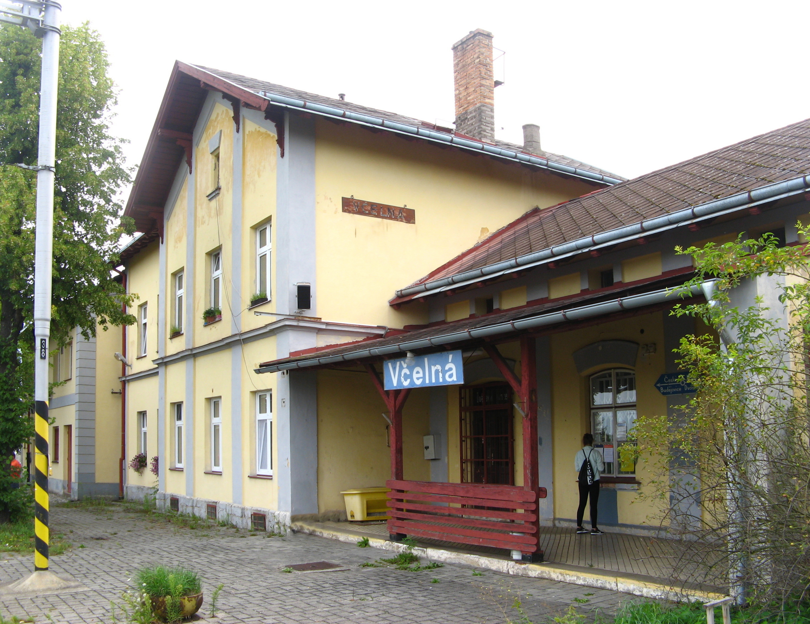 Železniční stanice Včelná na trati 196.